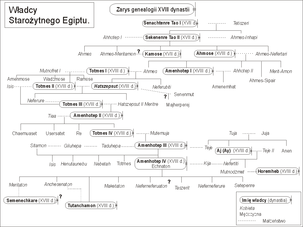 Genealogia XVIII dynastii-wersja zakualizowana